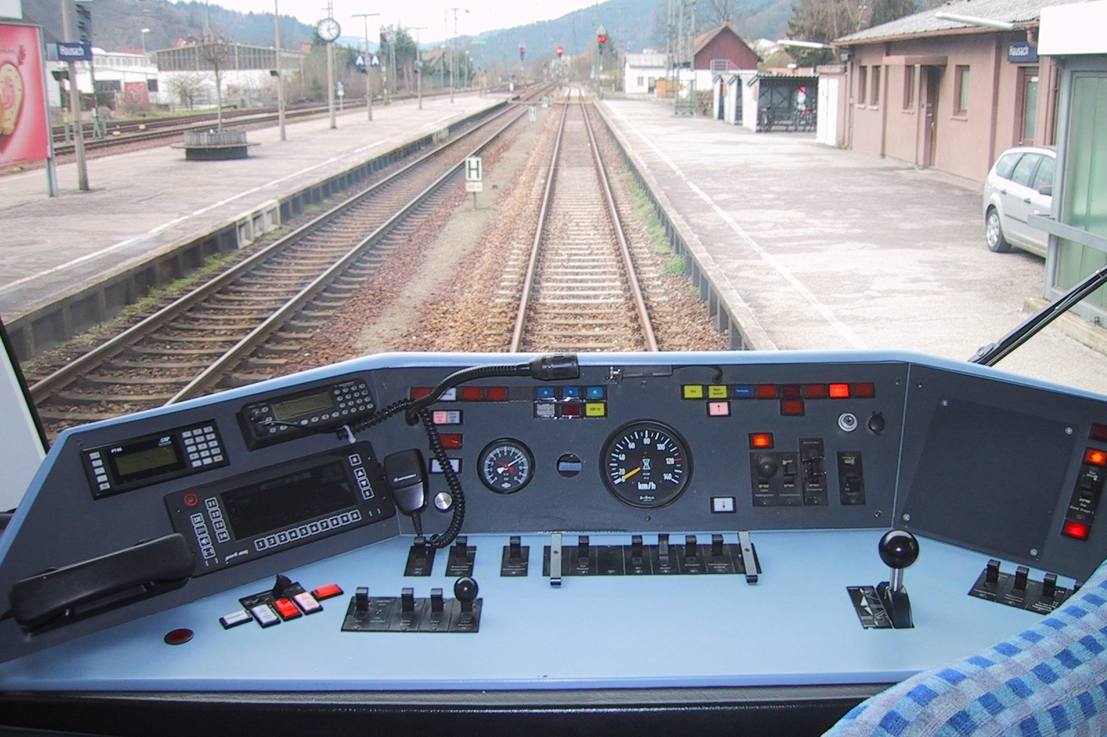 Führerstand eines Triebwagens der Ortenau-S-Bahn im Bahnhof Hausach